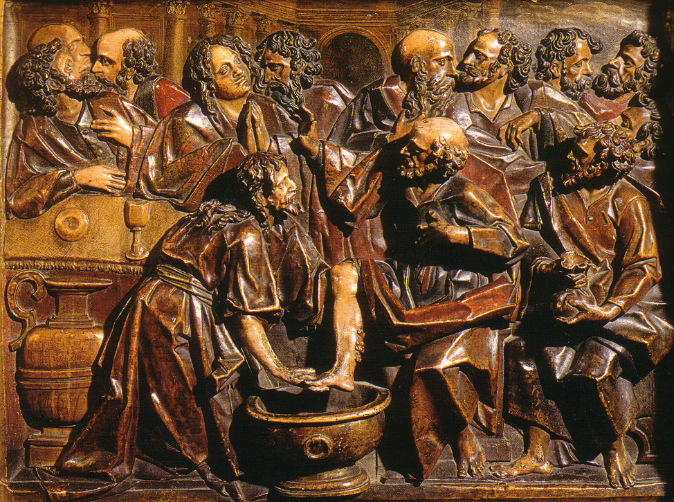 Lavatorio de los pies de los Apóstoles en la Ultima Cena. Relieve de estilo romanista del siglo XVI.